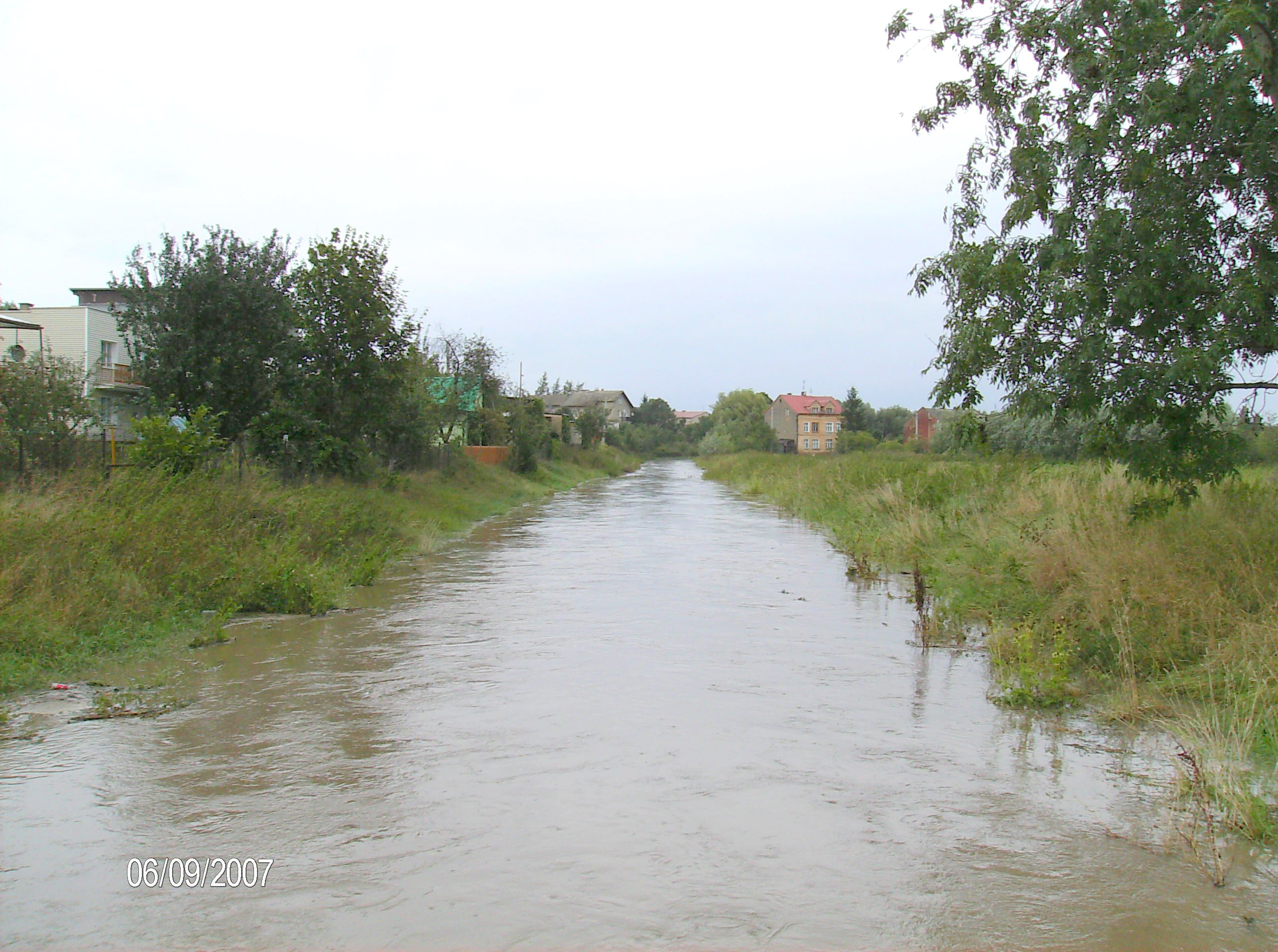 Wysoki stan wody na Troi w okolicach Kietrza po intensywnych opadach deszczu we wrześniu 2007